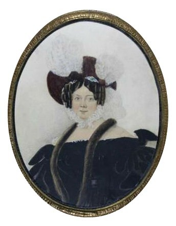 Людвига Даниловна Савоини, ур. Дункель